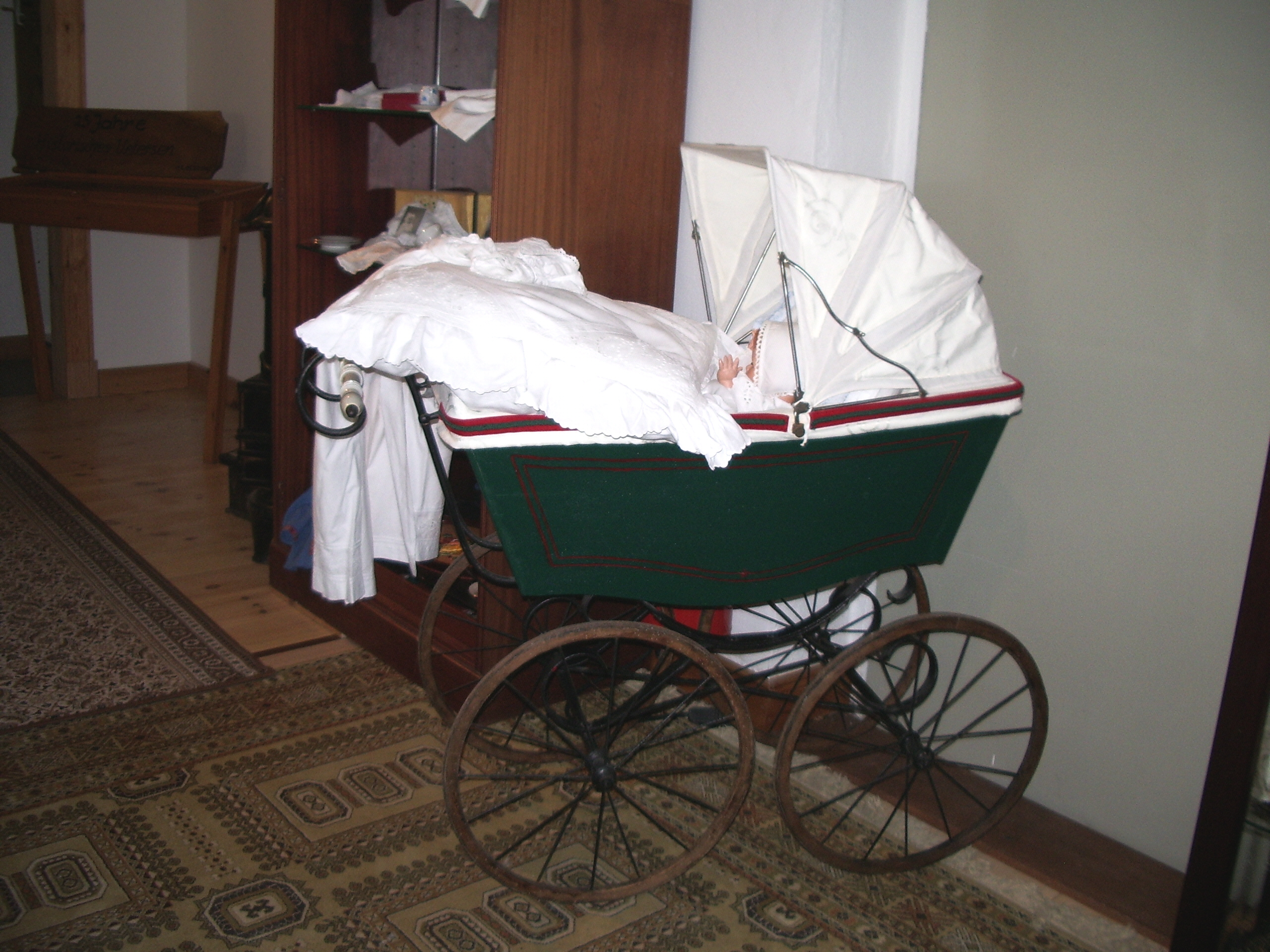 Kinderwagen aus dem Jahr 1908 im Stadt und Heimatgeschichtliches Museum Uetersen.